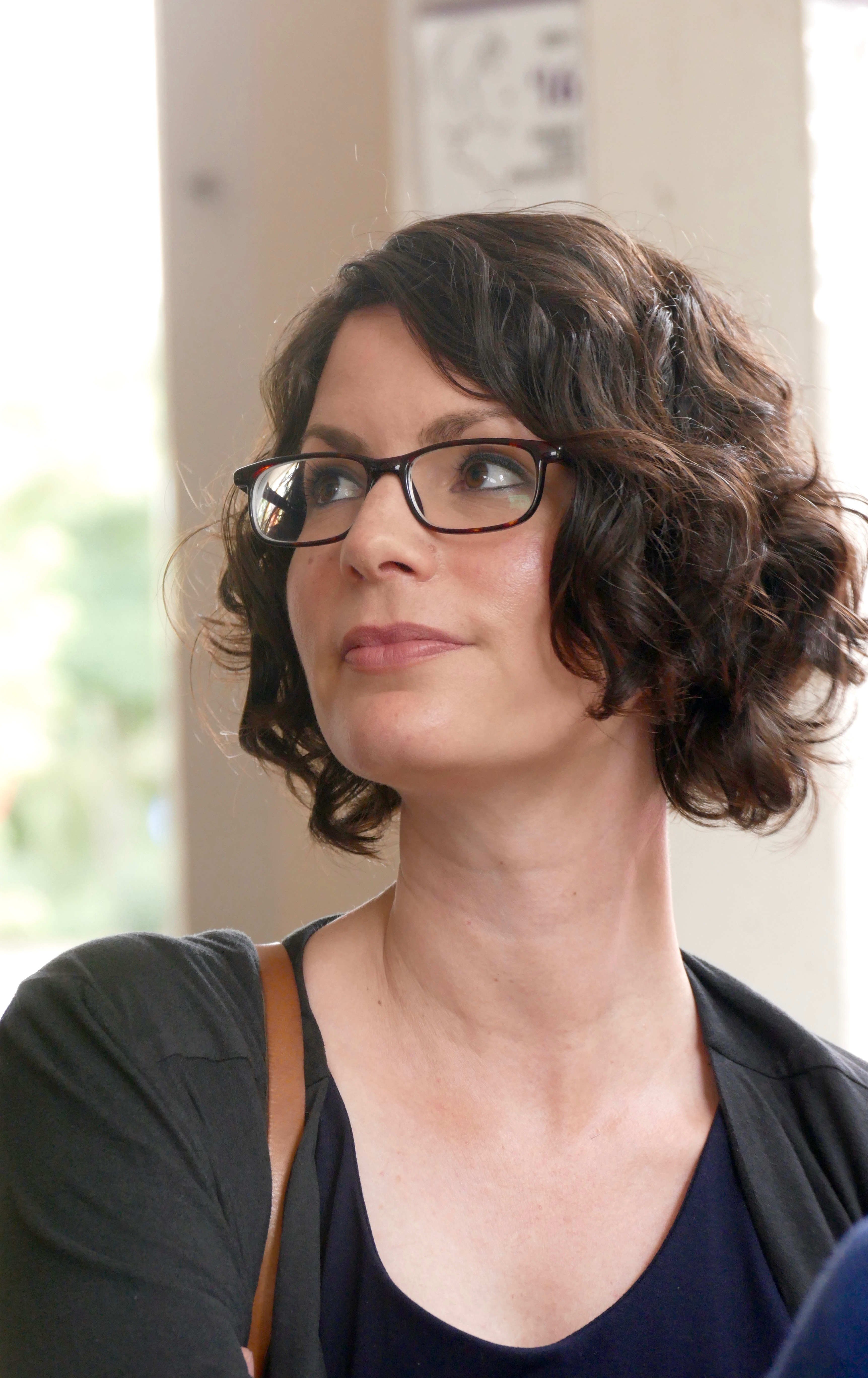 Isabelle Lehn im Garten des ORF-Theaters beim Ingeborg Bachmann-Preis 2016